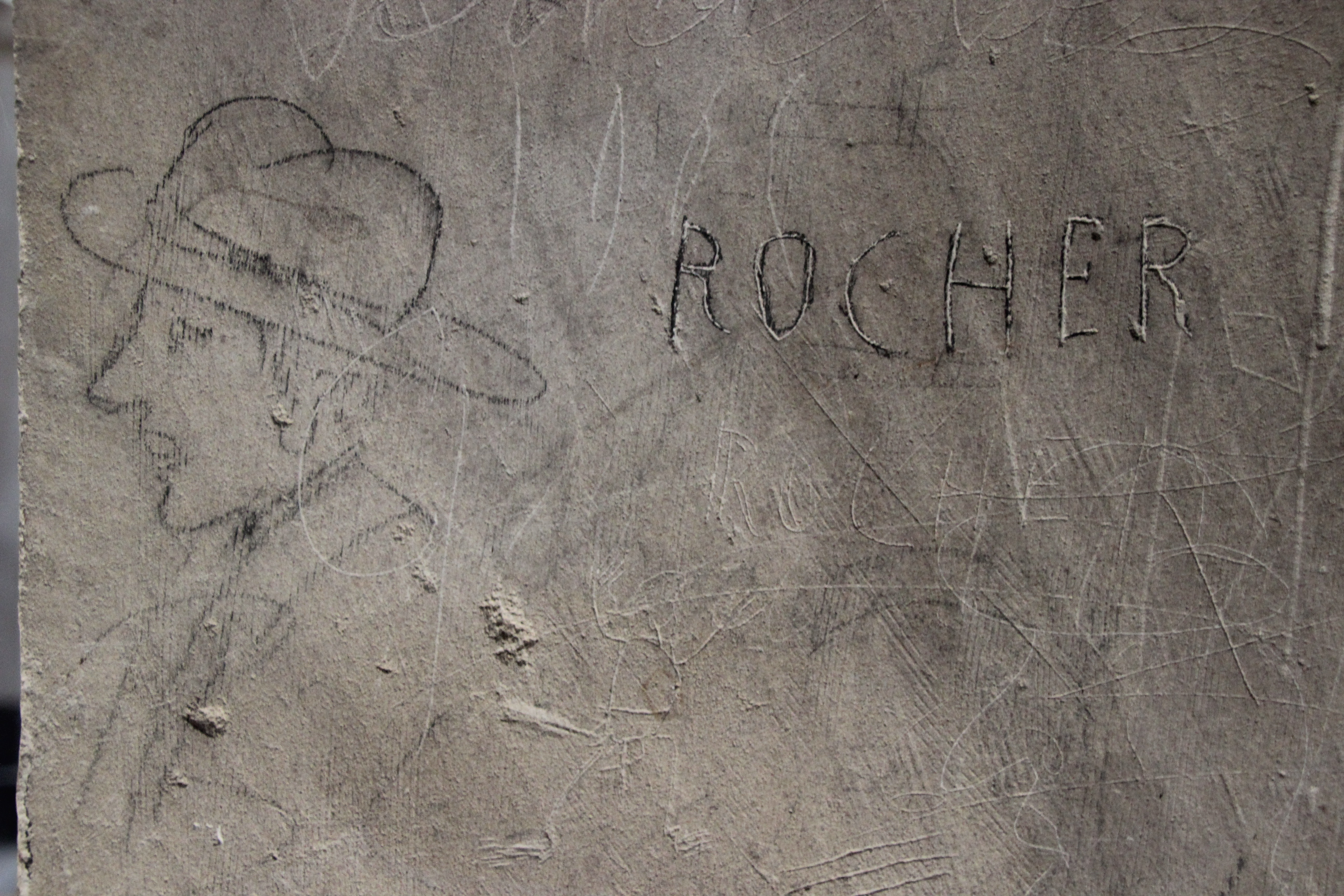 Ancienne prison (Pont-l'Évêque, Calvados)